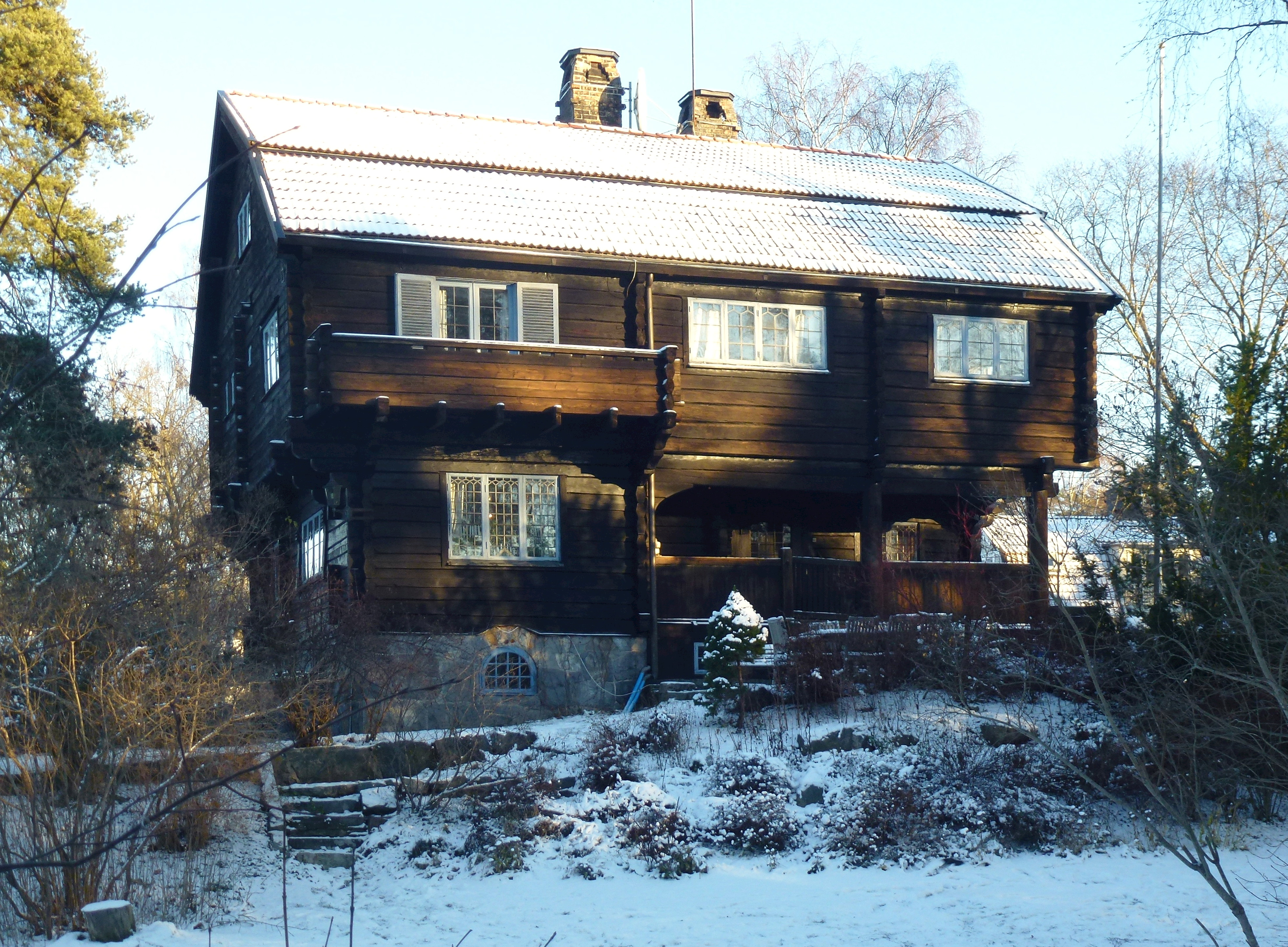 Laurinska villan, Hildingavägen 26, Danderyd, arkitekt Karl Güettler